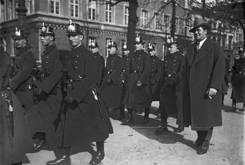 Der berühmte amerikanische Filmstar George B. Bancrofft der populärste Hollywoodstar, ist in Berlin eingetroffen Der berühmte amerikanische Filmstar George B. Bancrofft, welcher durch seine Filme "Unterwelt" und "Polizei" weltberühmt wurde, bei einem Spaziergang Unter den Linden in Berlin.